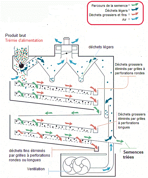 dessin montrant le cheminement des graines et des déchets, dans un nettoyeur séparateur plan.